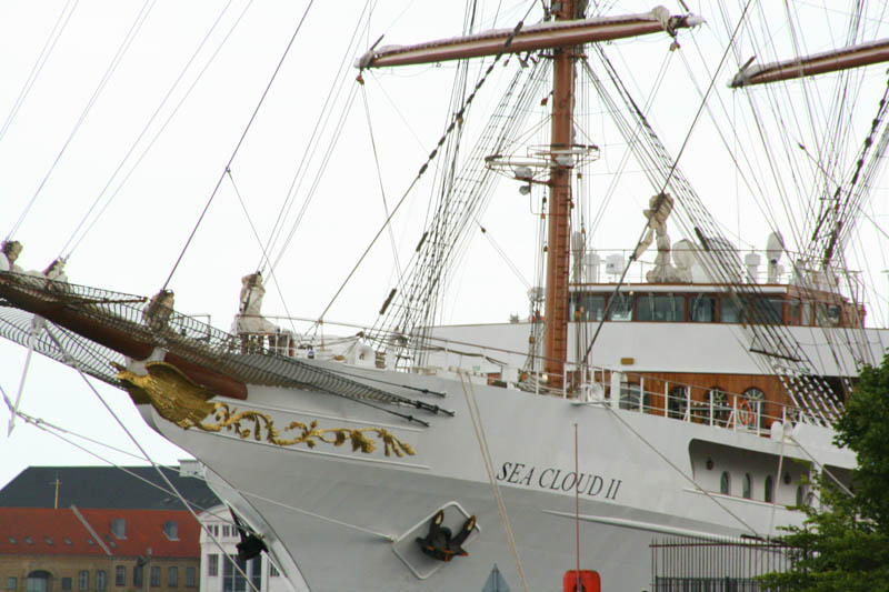 Le Sea Cloud II , voilierpaquebot moderne